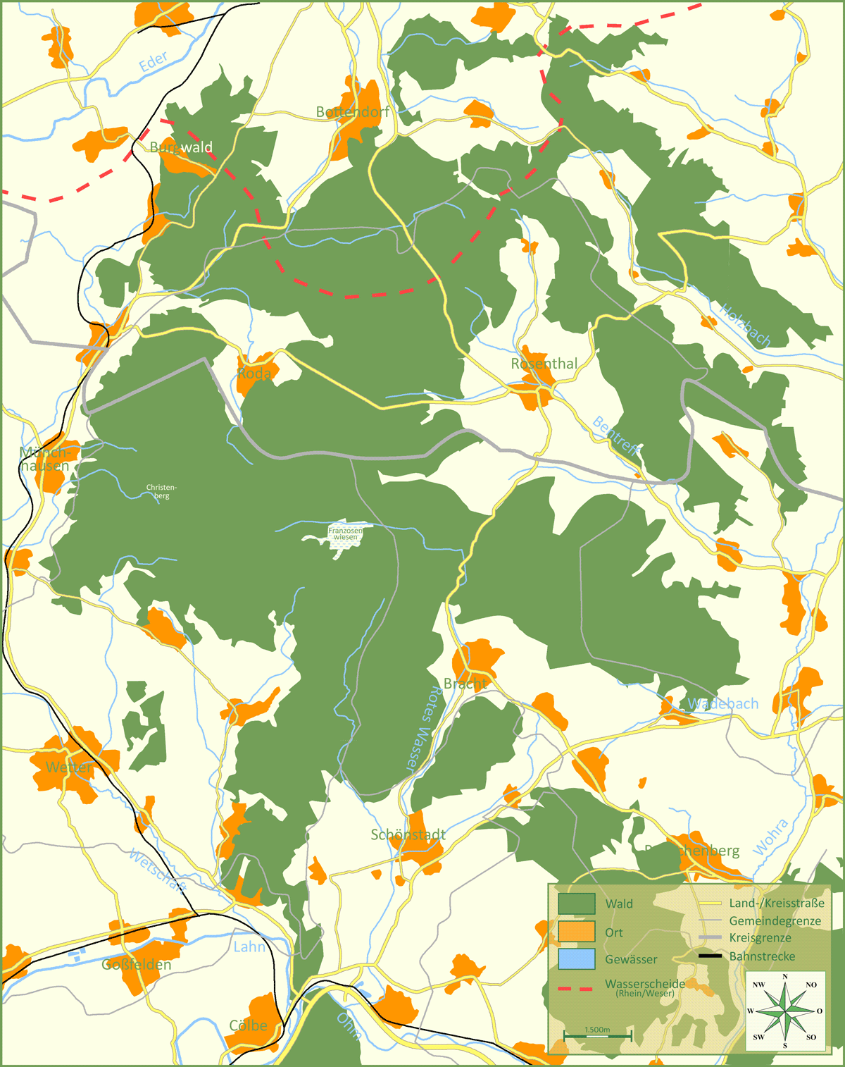 Karte des Mittelgebirges Burgwald